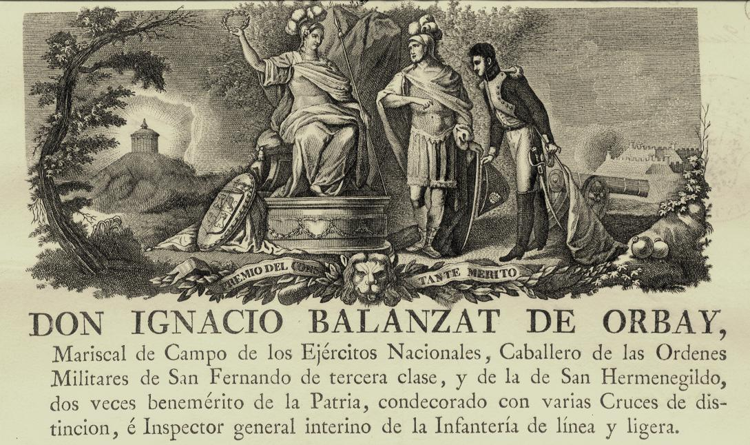 El Mariscal Balanzat rinde homenaje a Hispania antes de recibir sus honores S-XIX. Inspector General de Infanteria y Ministro de la Guerra.